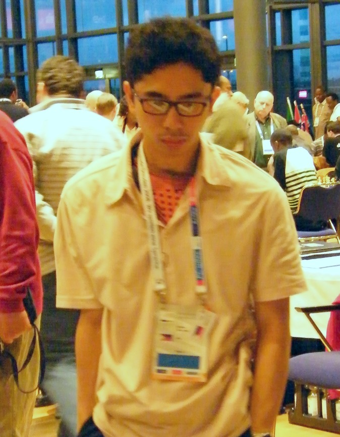 IM John Paul Gomez bei der Schacholympiade 2008 in Dresden